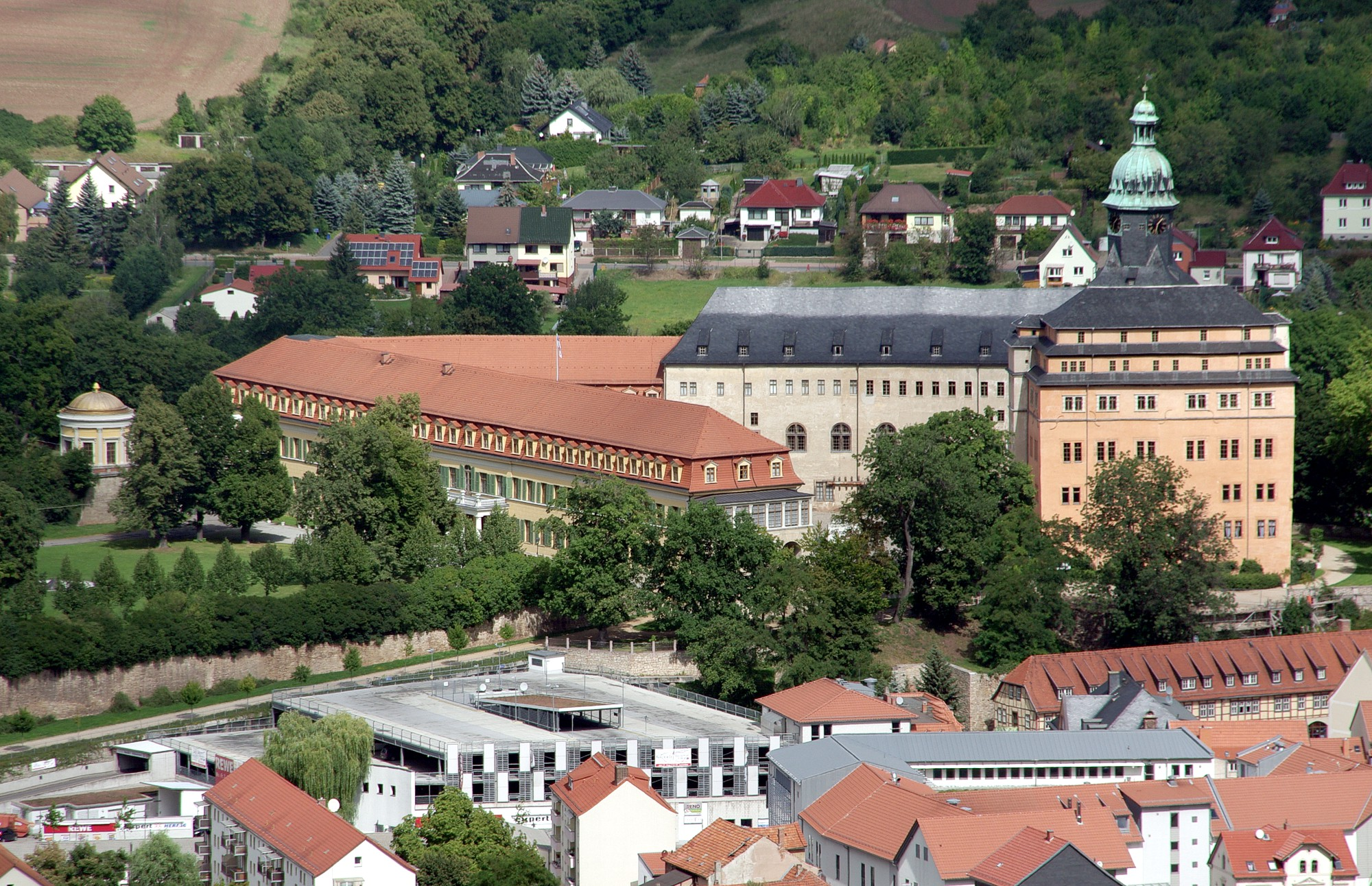 Das Schloss Sondershausen mit Rotunde (links) vom Rondell aus gesehen.